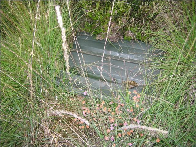 een foto van een plaatje op een plaatjesroute die wordt gemonitoord met de plaatjesmethode